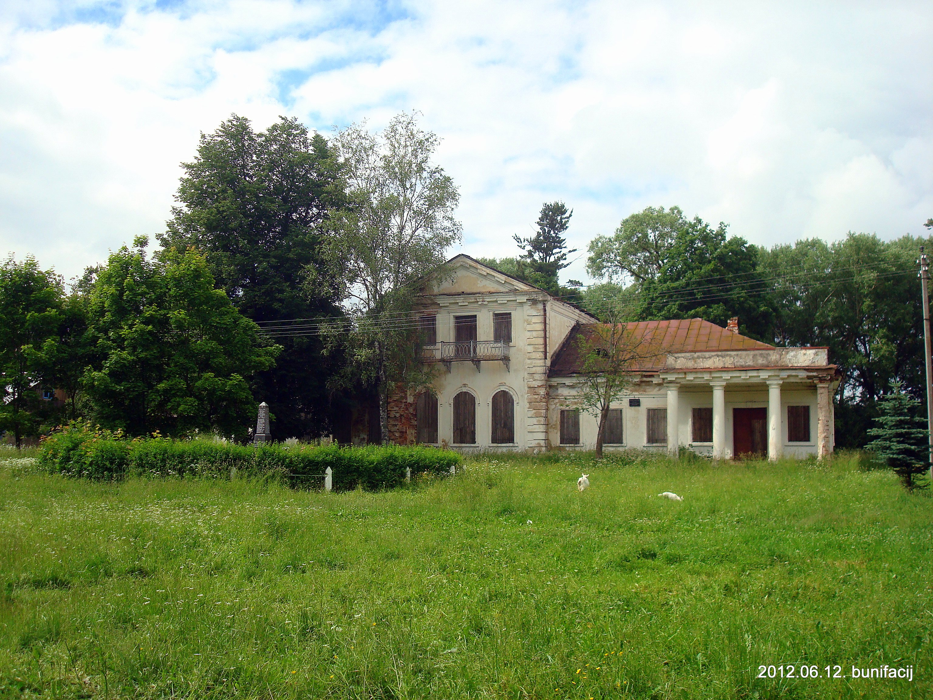 Дворец